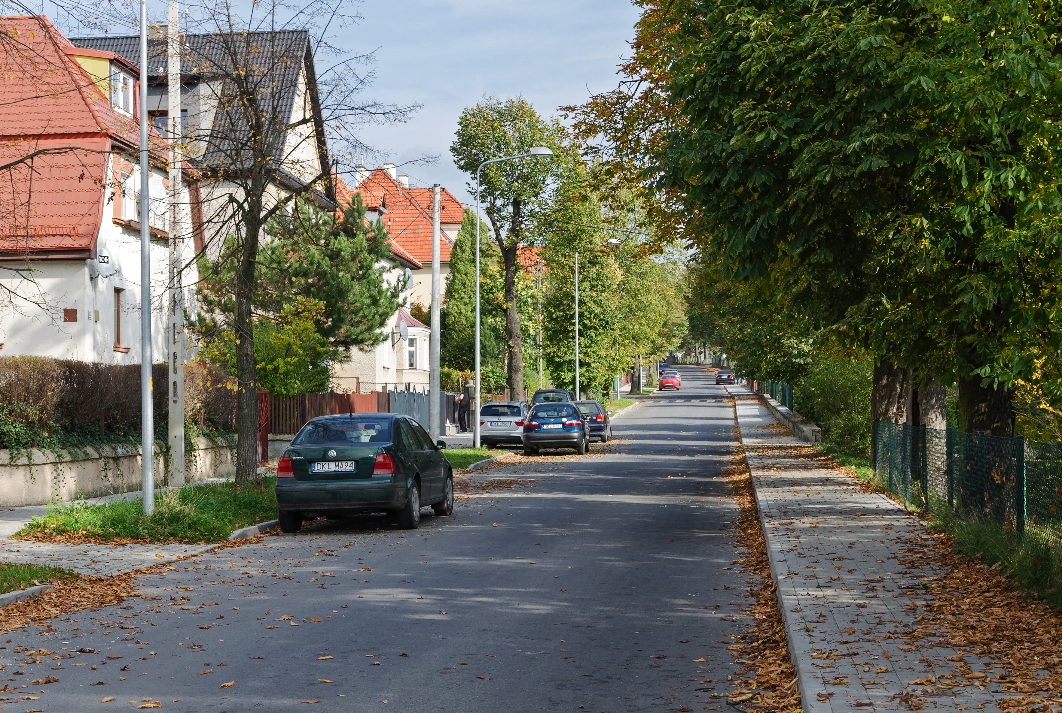 Kłodzko, ul. Walecznych